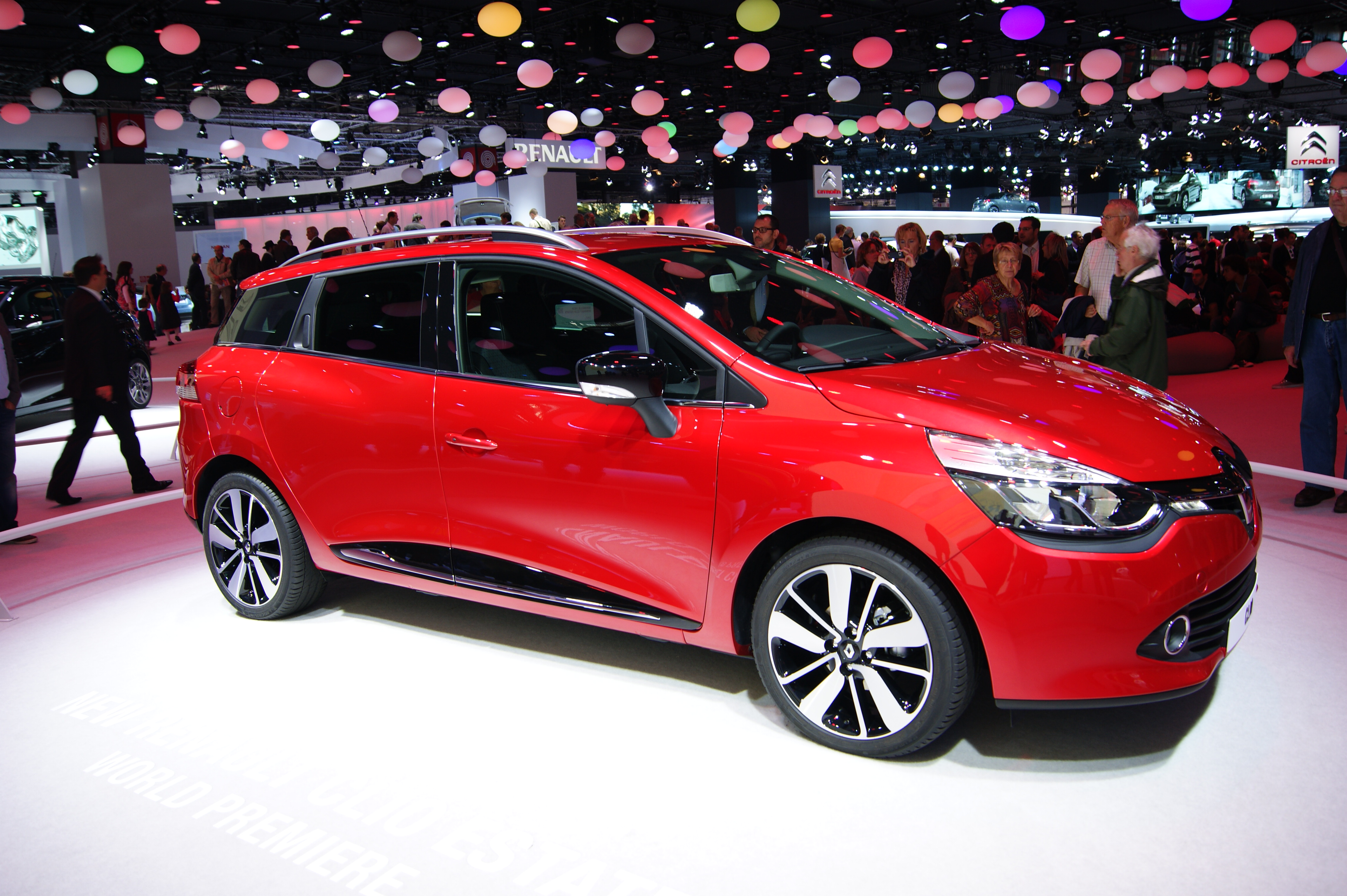 Renault Clio IV estate